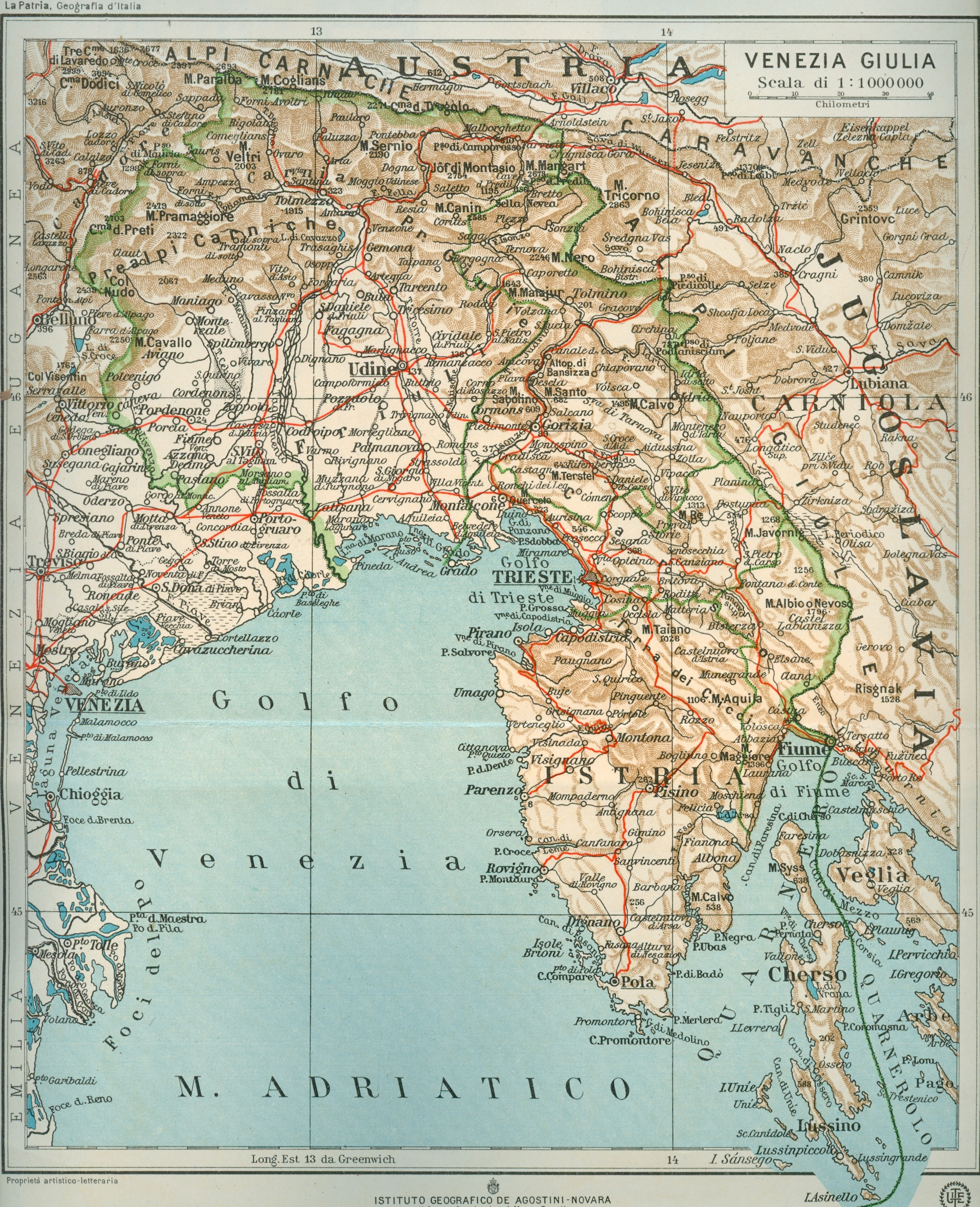 Furlan: 'Vignesie Julie' pal 'Congresso Geografico Italiano' (1921-1943)